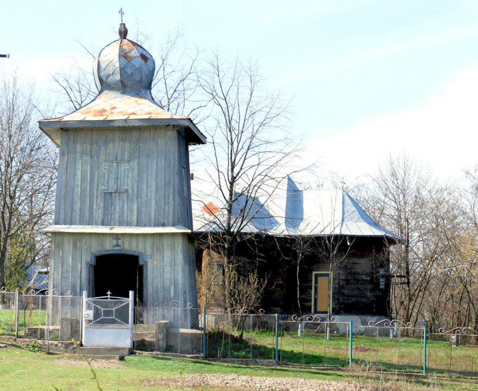 Biserica Sfintii Voievozi din Tanacu si clopotnita. vedere sudica, aprilie 2010.